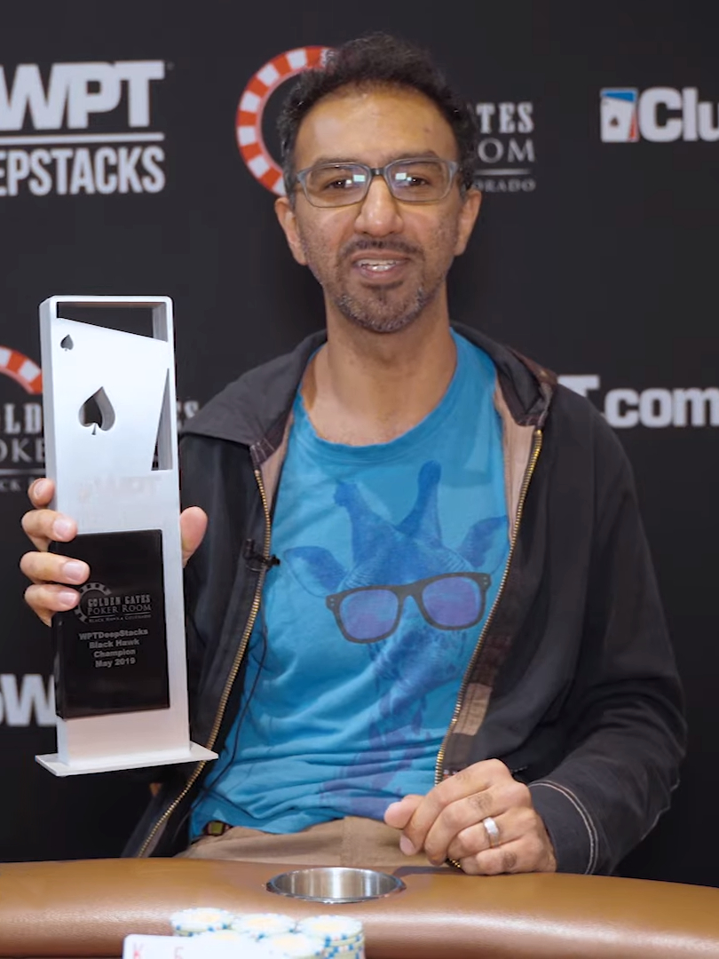 Faraz Jaka nach seinem Sieg beim WPTDeepStacks Black Hawk